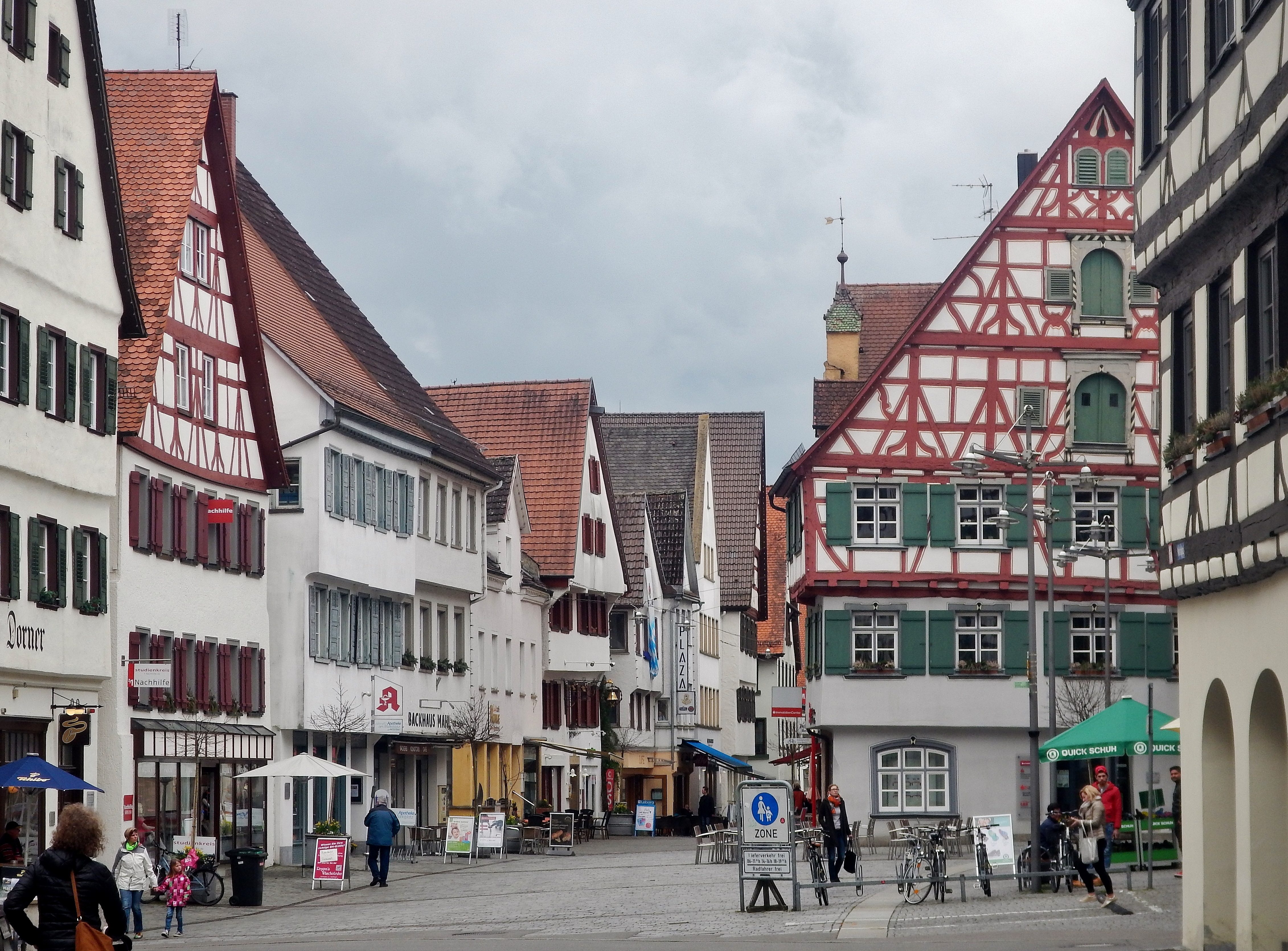 Marktplatz in Riedlingen